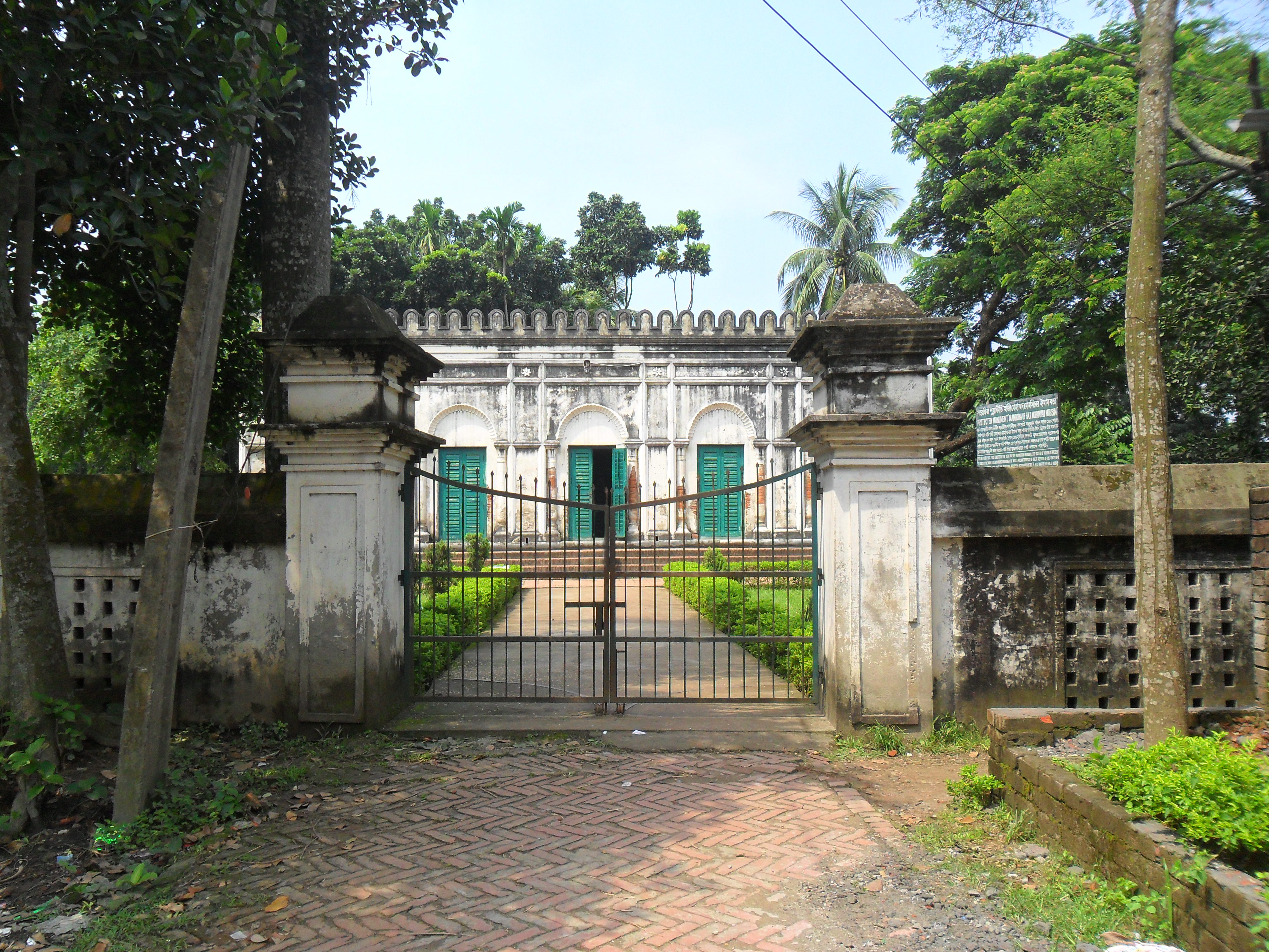 হাজী মোহাম্মদ মহসিন ইমামবাড়া